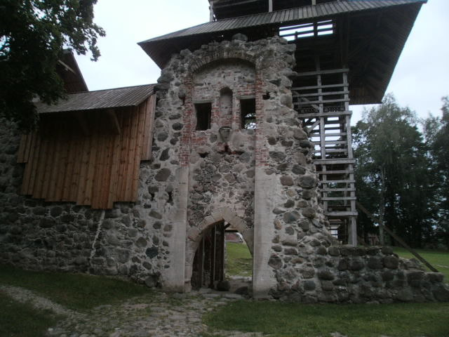 Vaade konvendihoonesse viivale peaväravale. Väravaava kohal nišis võis seista Jumalaema Maarja kuju.